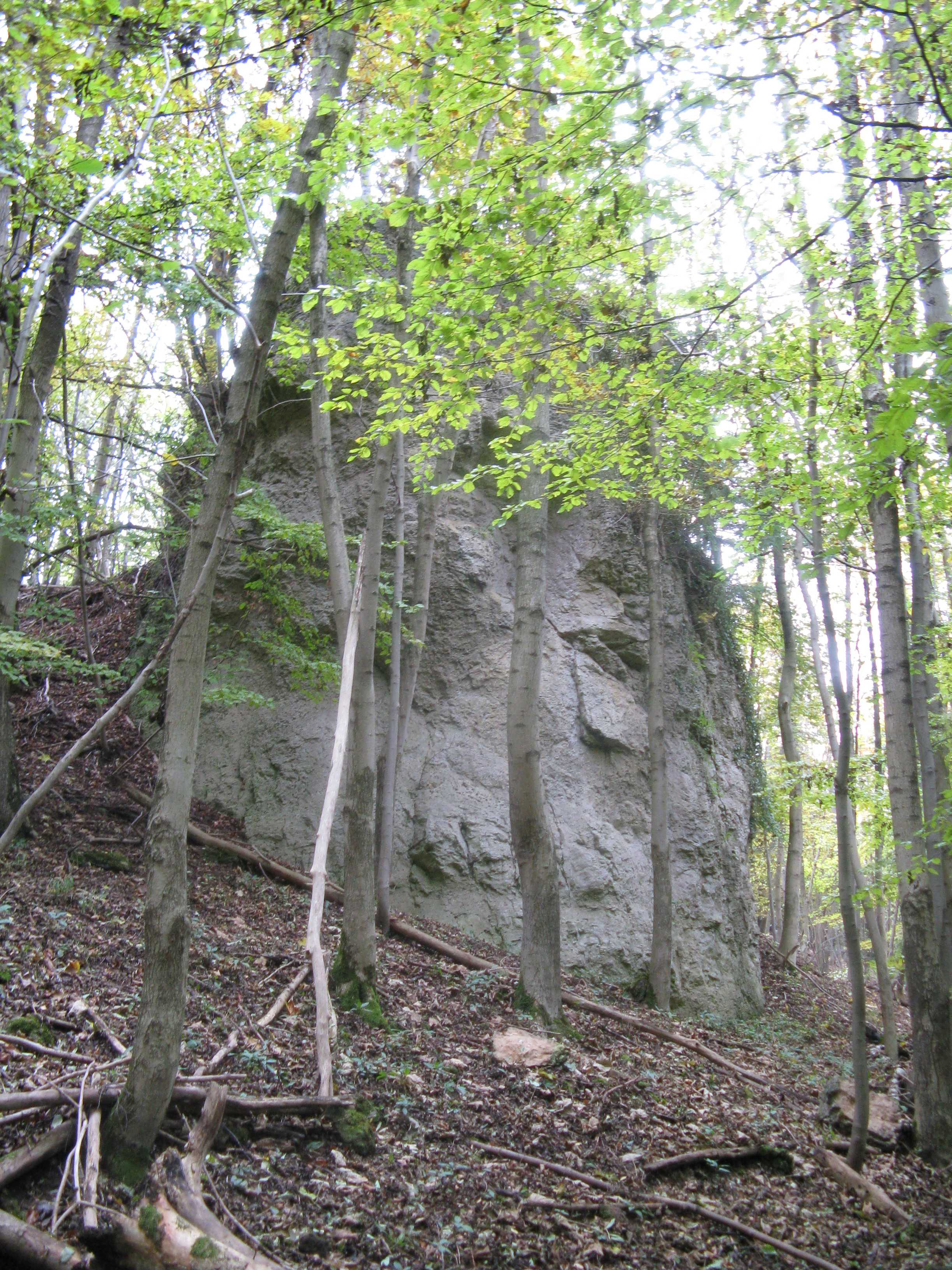 Dolomitfelsen am Knickelberg bei Herzberg am Harz